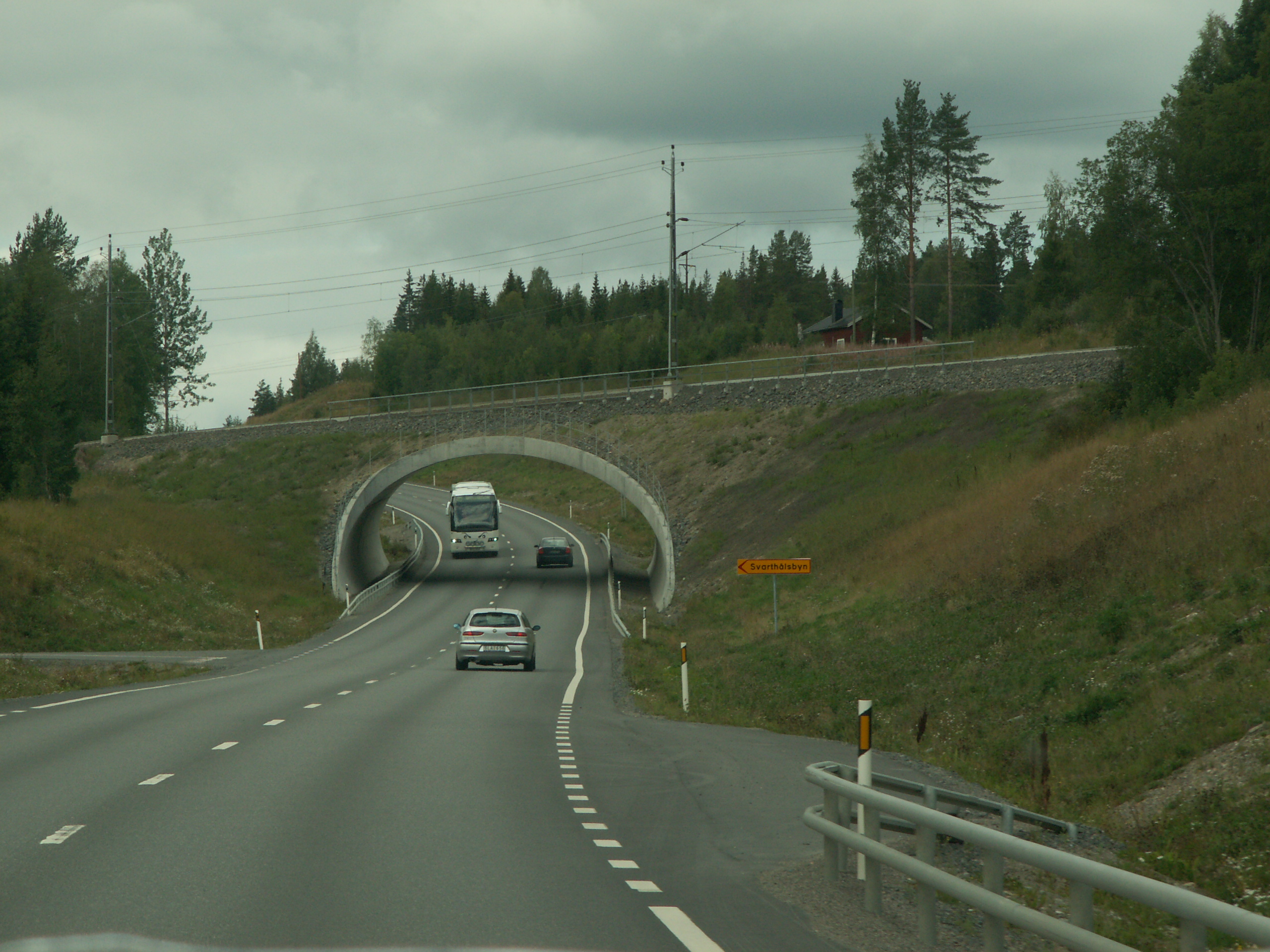 Tunnel (under järnvägen) längs riksväg 87 vid Svarthålsbyn i Ragunda kommun, Jämtlands län.